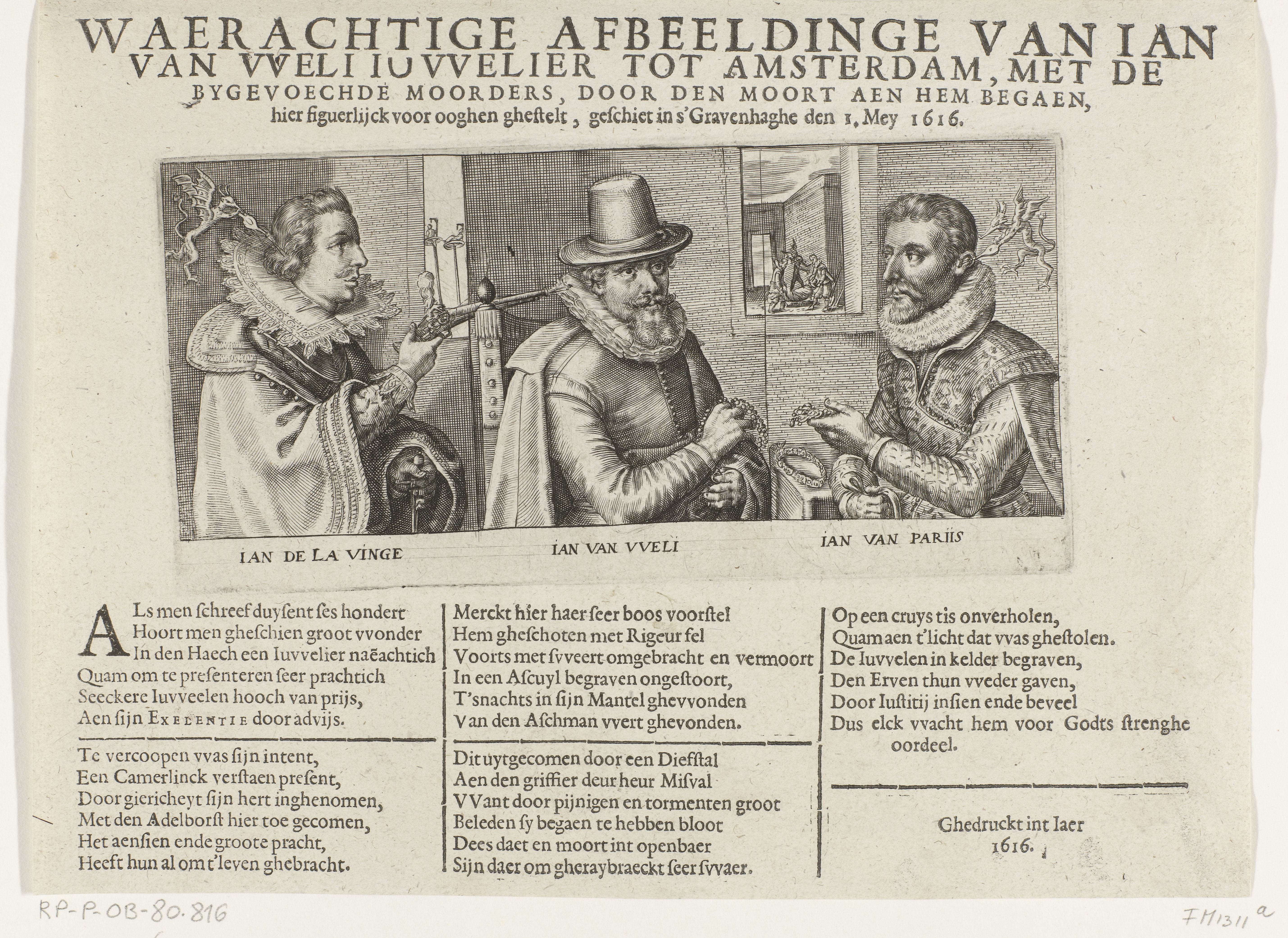 IdentificatieTitel(s): Moord op Jan van Wely, juwelier te Amsterdam, 1616Waerachtige afbeeldinge van Jan van Weli juwelier tot Amsterdam, met de bygevoechde moorders, door den moort aen hem begaen, hier figuerlijck voor oghen ghestelt, geschiet in s'Gravenhaghe den 1. Mey 1616 (titel op object)Objecttype: prent nieuwsprent Objectnummer: RP-P-OB-80.816Catalogusreferentie: FMH 1311-aHollstein Dutch 839Franken 926Omschrijving: De roofmoord op de door Maurits naar Den Haag ontboden Amsterdamse juwelier Jan van Wely, te Den Haag op 1 mei 1616. De moord met links Jan de la Vigne en rechts Jan van Parijs. Beiden worden door een duiveltje met een blaasbalg bij hun oor aangezet tot de moord. Op de achtergrond (zeer klein) het vinden van het lijk van de juwelier en de de lichamen van de geradbraakte moordenaars tentoongesteld op staken. Gedrukt op een blad met bovenaan de titel en onderaan 5 verzen van 6 regels in het Nederlands.VervaardigingVervaardiger: prentmaker: Crispijn van de Passe (I)prentmaker: Crispijn van de Passe (II)Plaats vervaardiging: Noordelijke NederlandenDatering: 1616Fysieke kenmerken: gravure met tekst in boekdrukMateriaal: papier Techniek: graveren (drukprocedé) / boekdrukAfmetingen: plaatrand: h 95 mm × b 195 mmblad: h 195 mm × b 265 mmOnderwerpWat: murderWanneer: 1616-05-01 - 1616-05-01Wie: Maurits (prins van Oranje)Jan van WelyJan van ParijsJan de la VigneVerwerving en rechtenVerwerving: aankoop 1881Copyright: Publiek domein